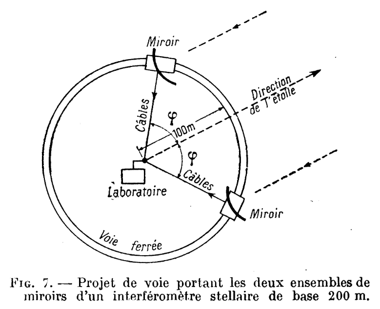 Les deux wagonnets roulent sur une voie circulaire d’un diamètre de 200 mètres. En fonctionnement, ces deux wagonnets sont entraînés sur la voie par des moteurs électriques, de façon à maintenir la droite qui les joint normale à la direction de l’étoile. La longueur de base reste ainsi constante pendant la durée d’une observation et les chemins optiques conservent une différence constante pour la lumière qui atteint les deux miroirs ; un défaut de ce dispositif est que l’angle de position de la source change continuellement par rapport à la base. La position des wagonnets est définie à 10 cm près. Les miroirs sont orientés vers l'étoile par deux dispositifs. Le premier est une calculatrice électro-mécanique qui fournit continuellement l’azimut et la hauteur de l’étoile. La valeur de l’azimut est transmise aux deux wagonnets par deux différentiels qui ajoutent et retranchent l’angle 'p' et déterminent ainsi la longueur de la base. La valeur de la hauteur commande directement l’inclinaison des miroirs. Pour que ce système fonctionne avec une exactitude suffisante, il serait nécessaire de poser la voie avec une très grande précision, et, pour éviter cette difficulté, l’orientation des miroirs est corrigée par un système auxiliaire. Celui-ci consiste en une cellule photoélectrique qui observe l’étoile à travers un obturateur tournant et corrige l’azimut et la hauteur des ensembles de miroirs de façon à centrer l’image de l’étoile sur la cathode de la cellule principale.